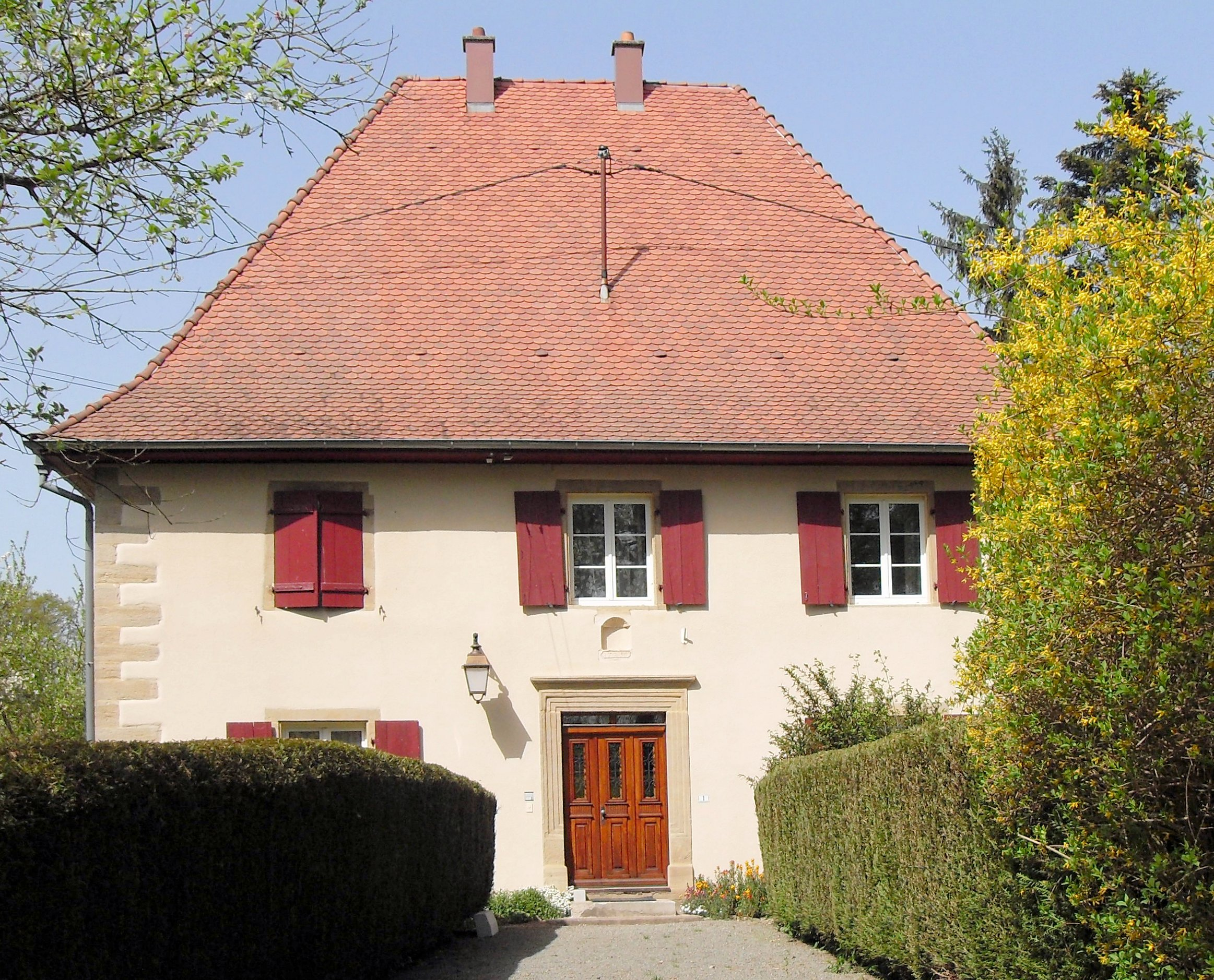 La mairie de Saint-Cosme